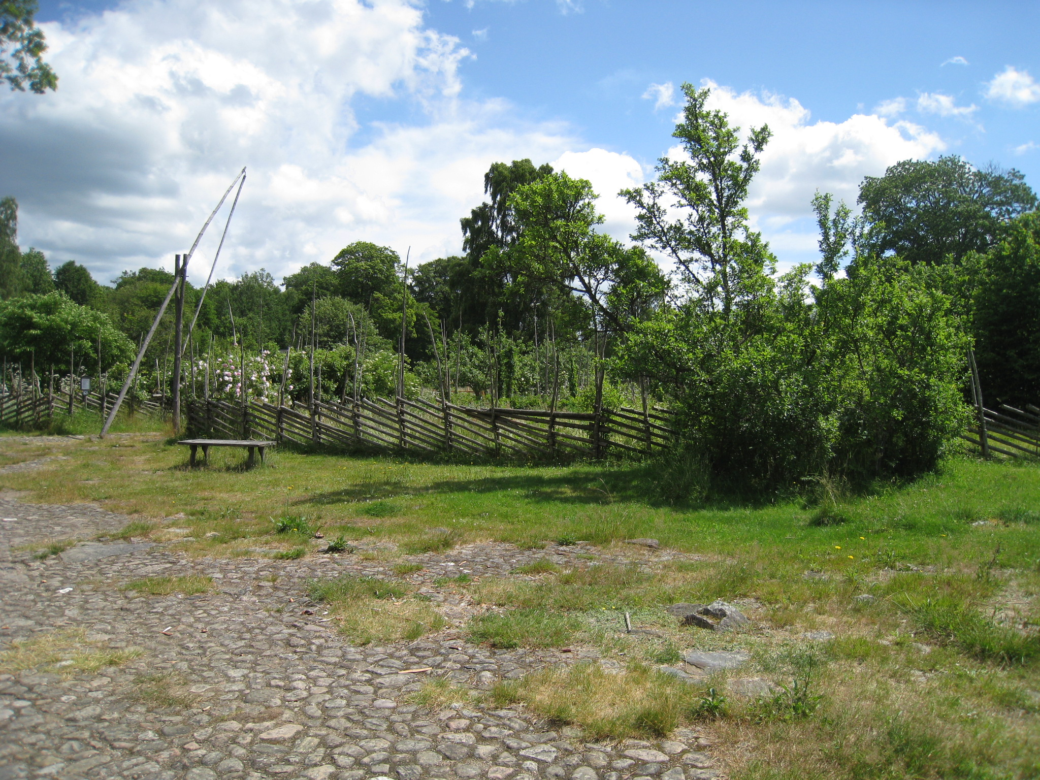 Linnés Råshult, örtagård och humlegård. Gården Råshult i Stenbrohults socken i Småland är känt som Carl von Linnés hembygd. Stenbrohults socken ingick i Allbo härad i Värend.